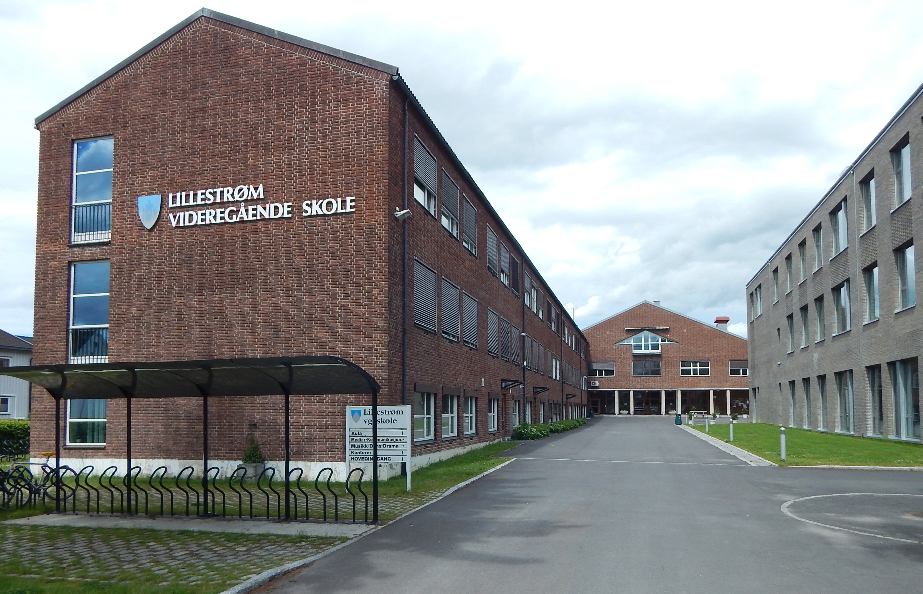 Lillestrøm videregående skole